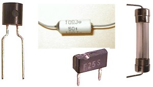 Autres types de fusibles utilisées dans les appareils électroniques Par andré Boivin